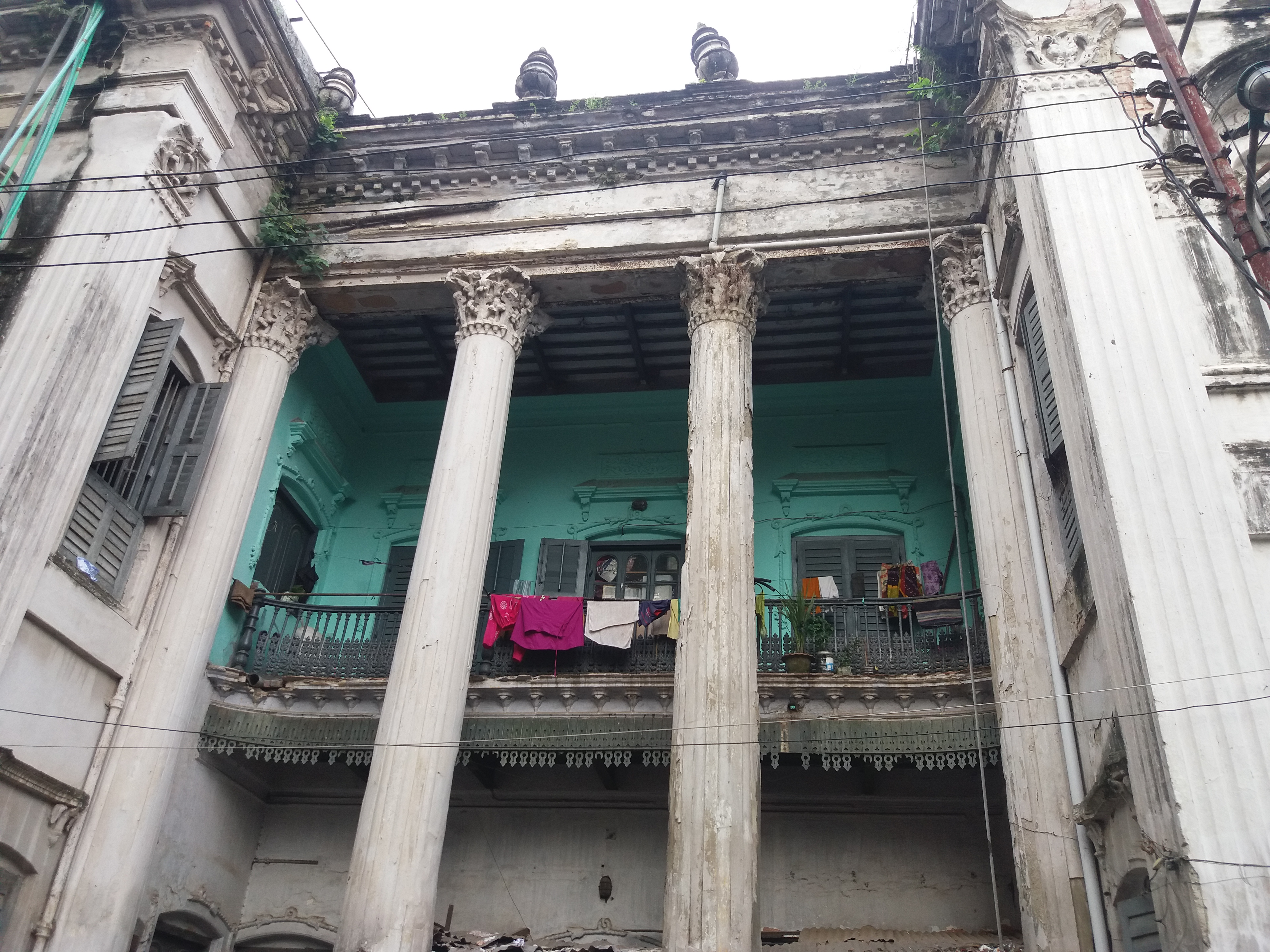 সূত্রাপুর জমিদার বাড়ী